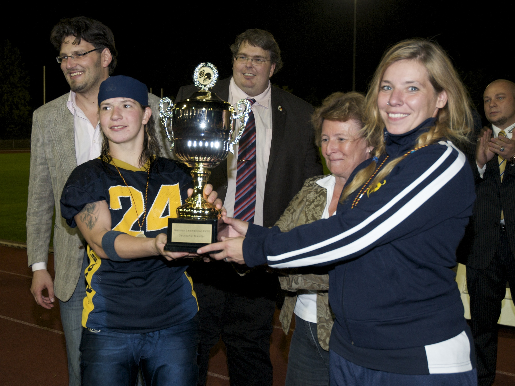 Pokal für den - Ladiesbowl XVIII - Sieger 2009, die Berlin Kobra Ladies